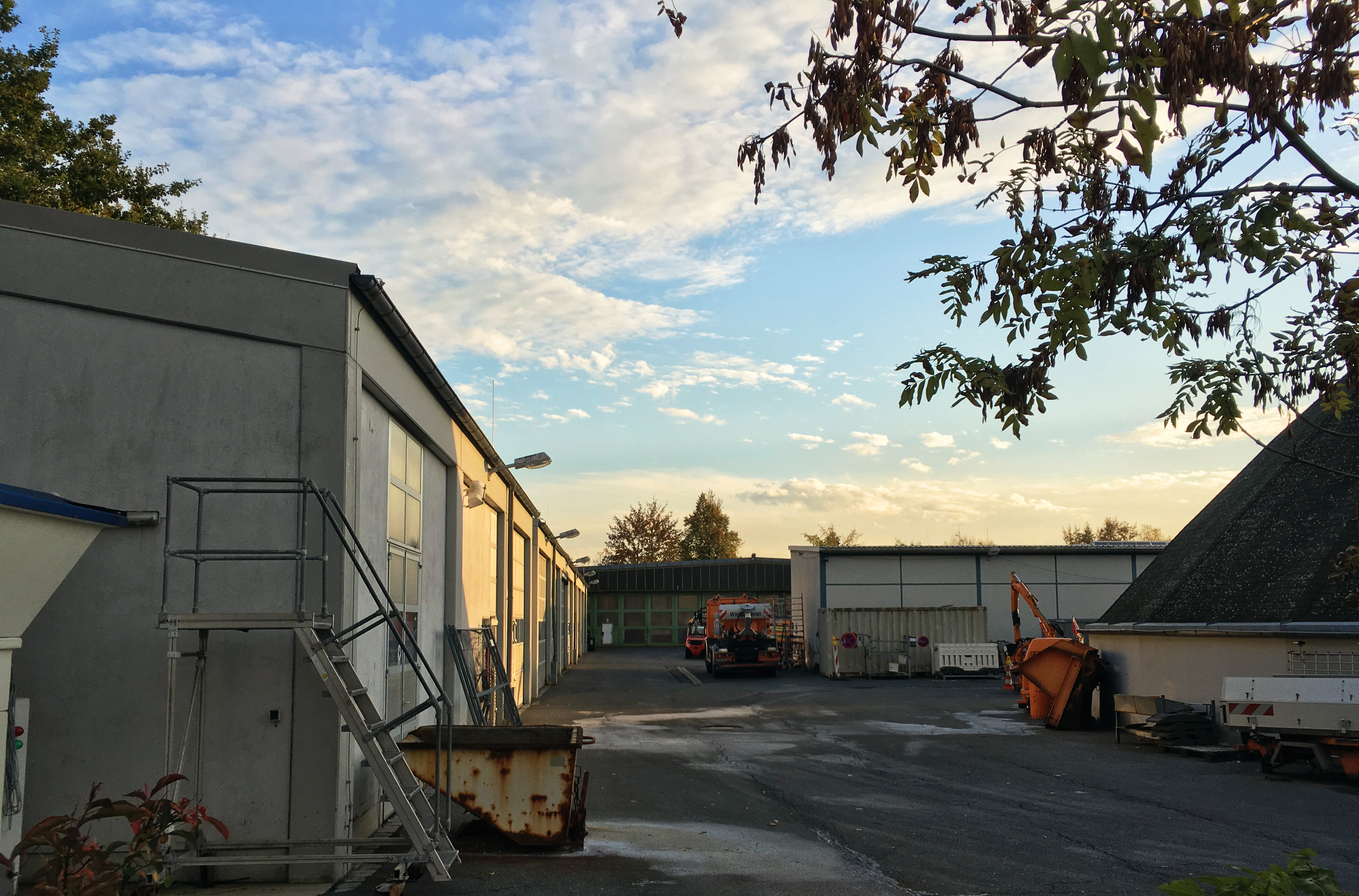 SÖR-Betriebshof auf dem Areal des ehemaligen